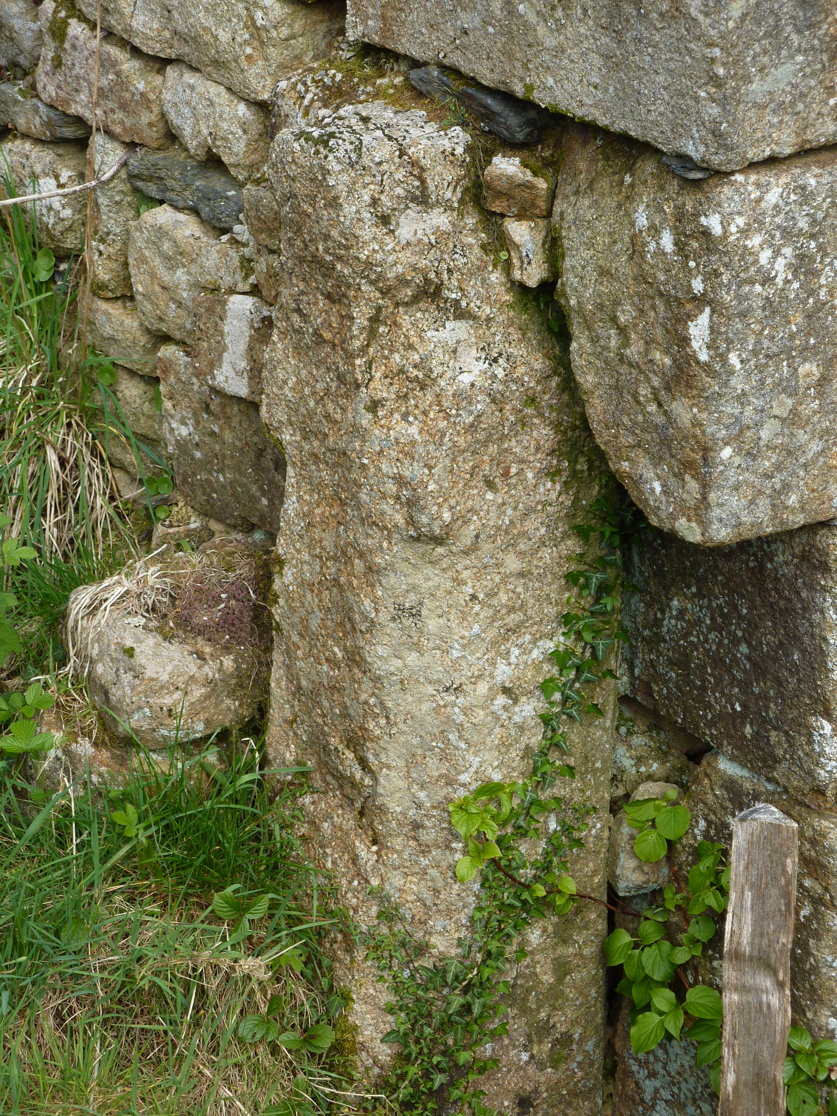 Partie d'un des anciens piliers de justice inclus dans un mur du manoir de Botmeur